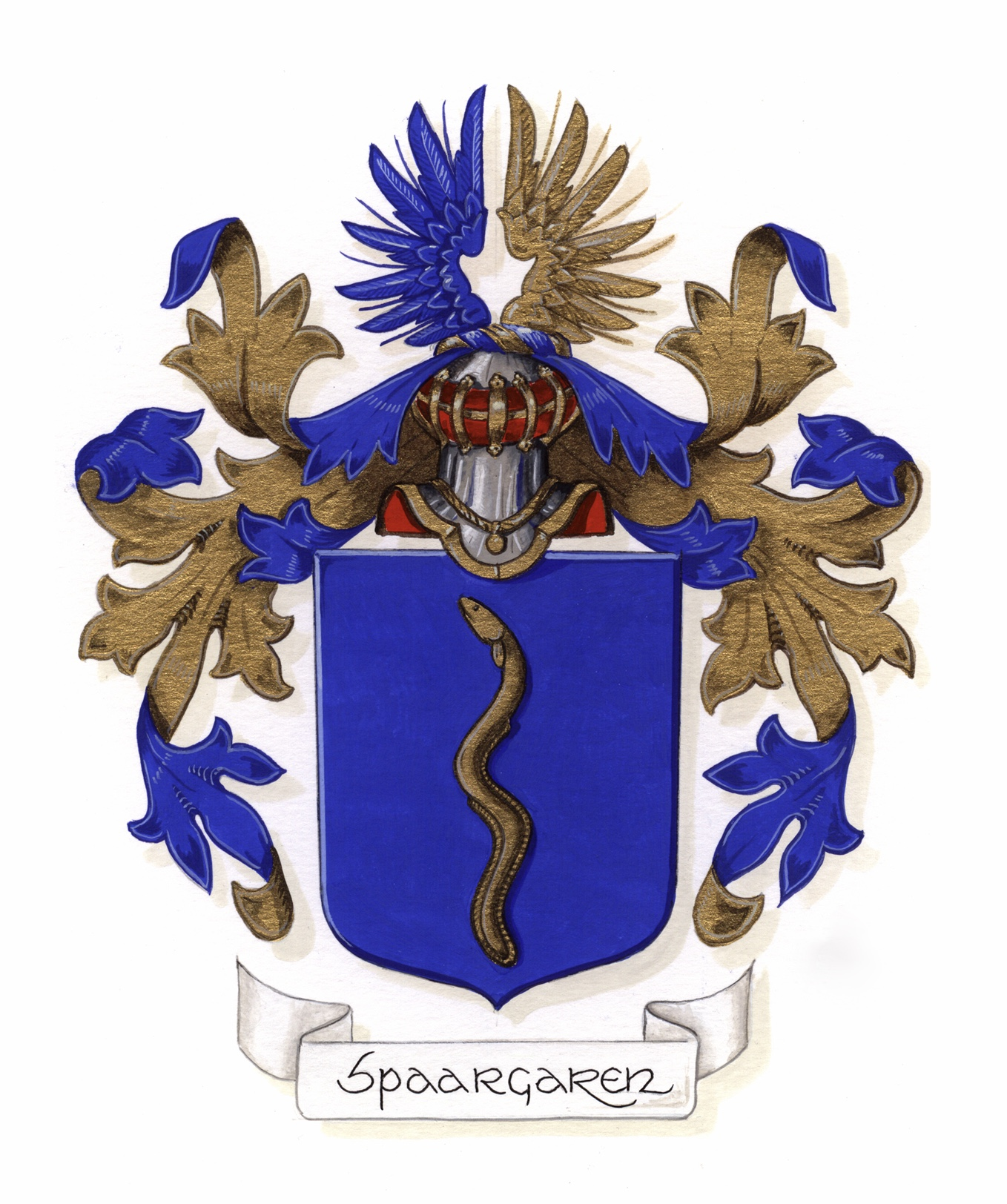 Uitvoering van familiewapen van de familie Spaargaren in kleur